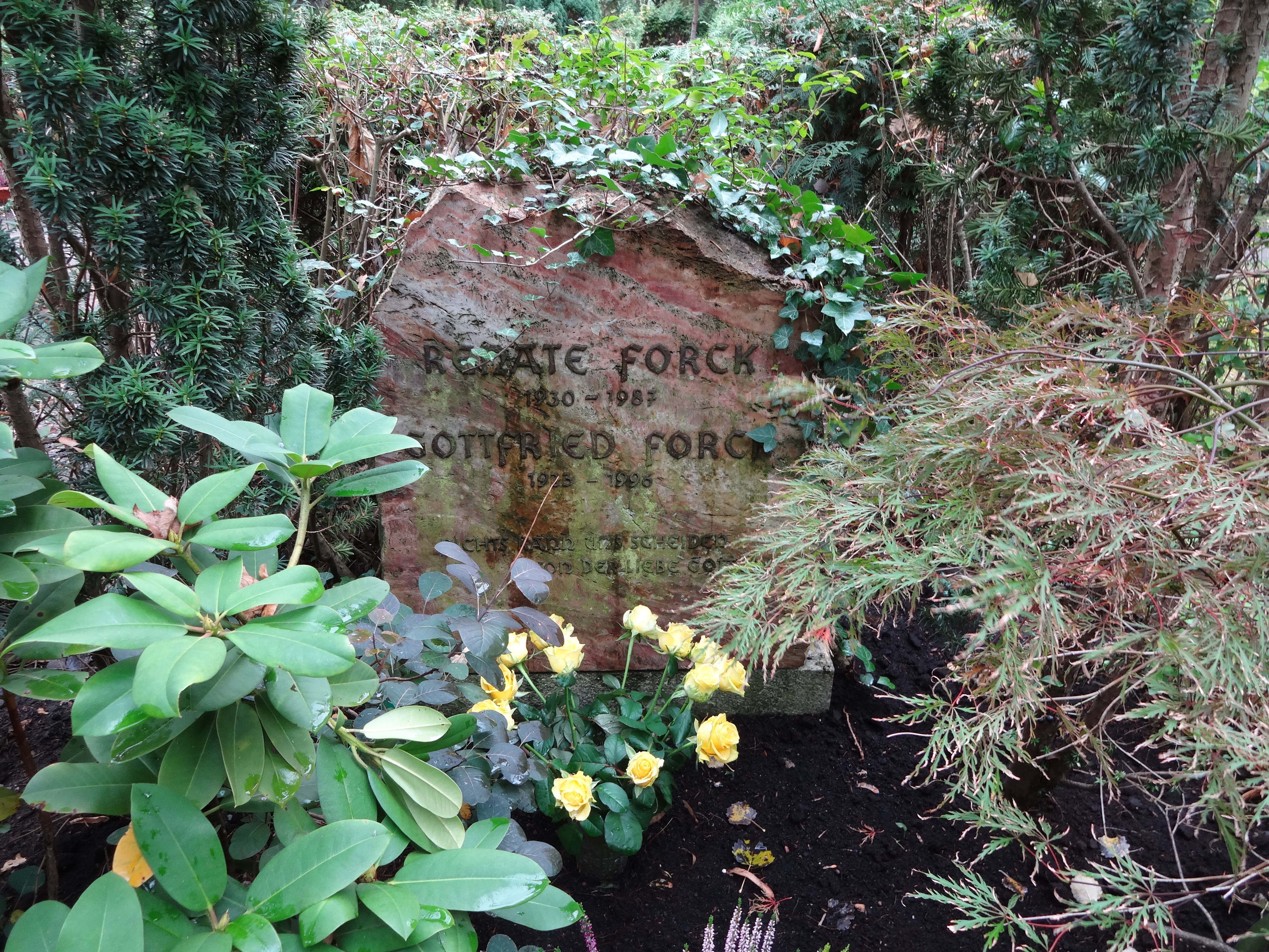 Friedhof der Auferstehungsgemeinde in Berlin-Weißensee; Grab von Gottfried Forck; Ehrengrab